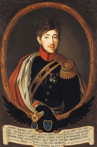 Беларуская (тарашкевіца): Партрэт Дамініка Гераніма Радзівіла (Daminik Hieranim Radzivił)